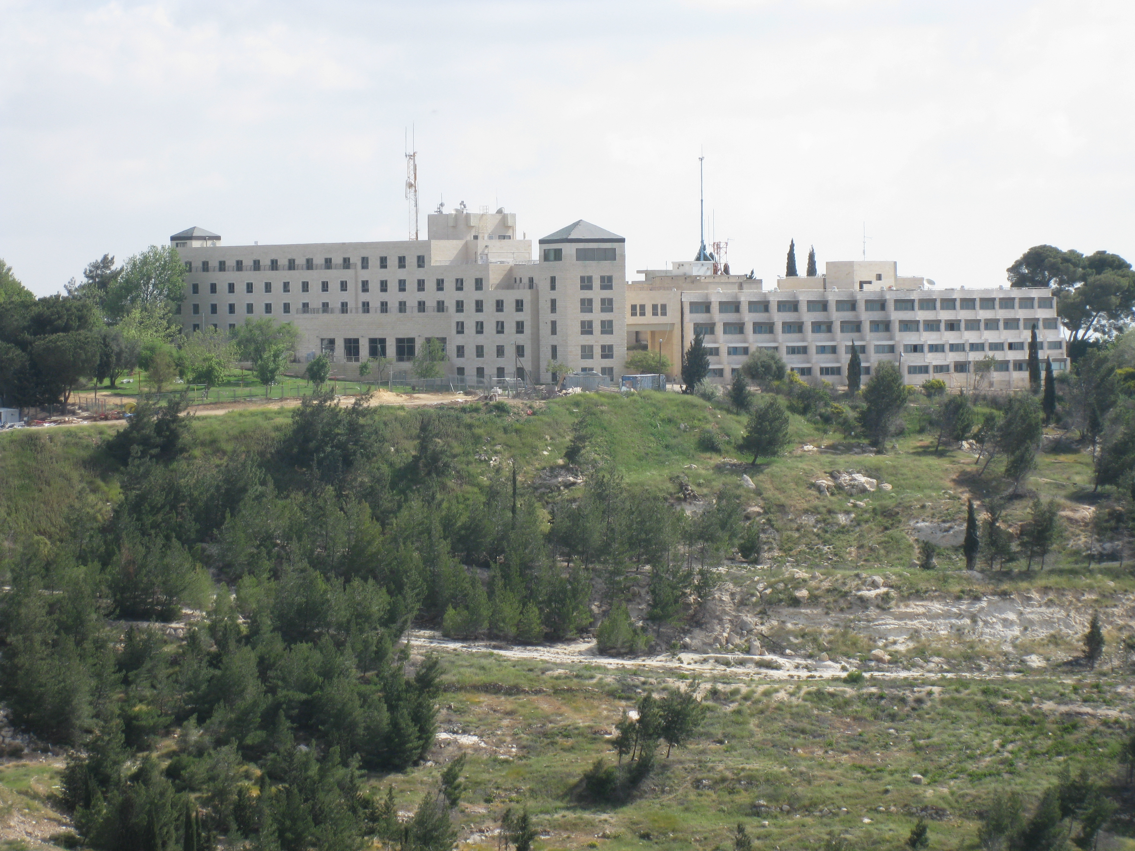 Views from Givat HaArbaa, near Hebron road, Jerusalem הנוף מגבעת הארבעה, מזרחית לדרך חברון ודרומית לרמת רחל, ירושלים